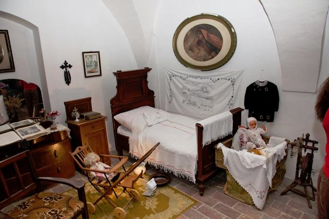 Kinderzimmer wie einst, Foto von Fam. Mayerh. 2010